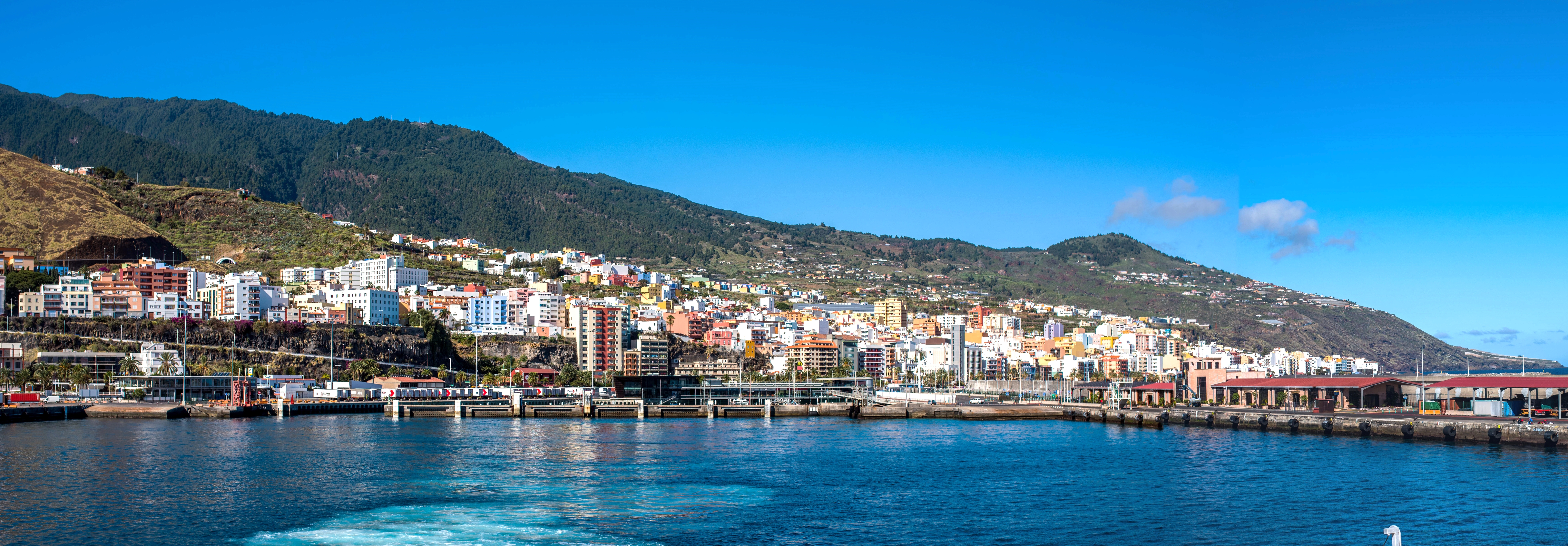 Santa Cruz, La Palma, Canary Islands